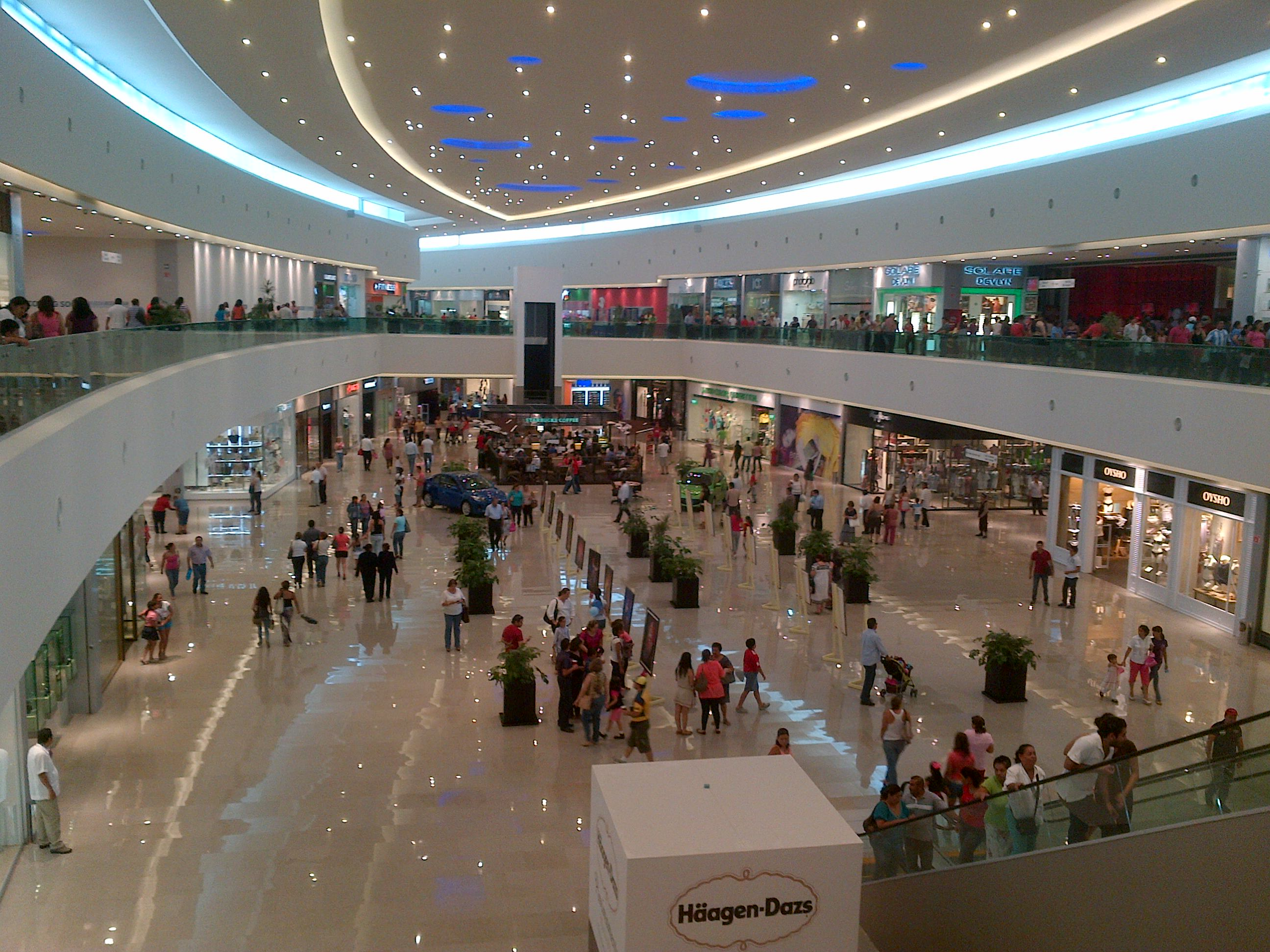 Interior de la Plaza Altabrisa, La sexta plaza comercial más grande del país y la más grande del sureste, con 220 locales comerciales y 4 tiendas ancla (Palacio de Hierro, Liverpool, Sears y Samborn's).